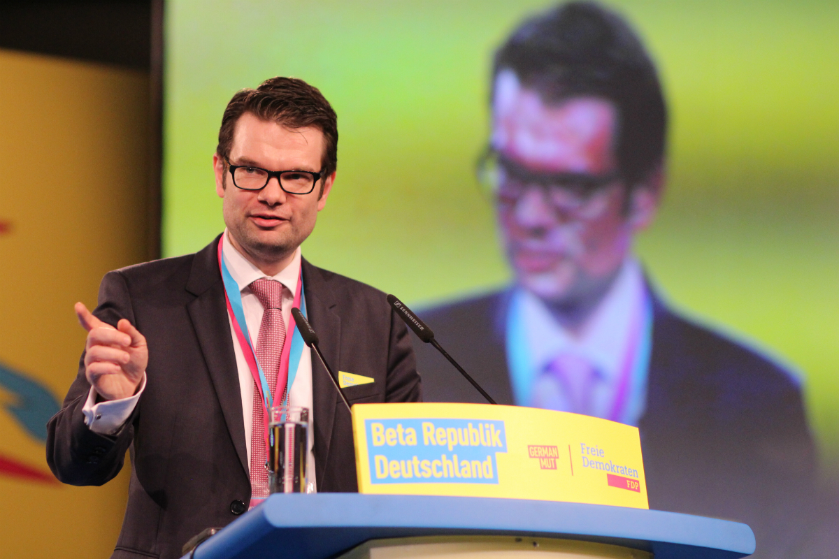 Marco Buschmann 2016 Bundesparteitag Berlin